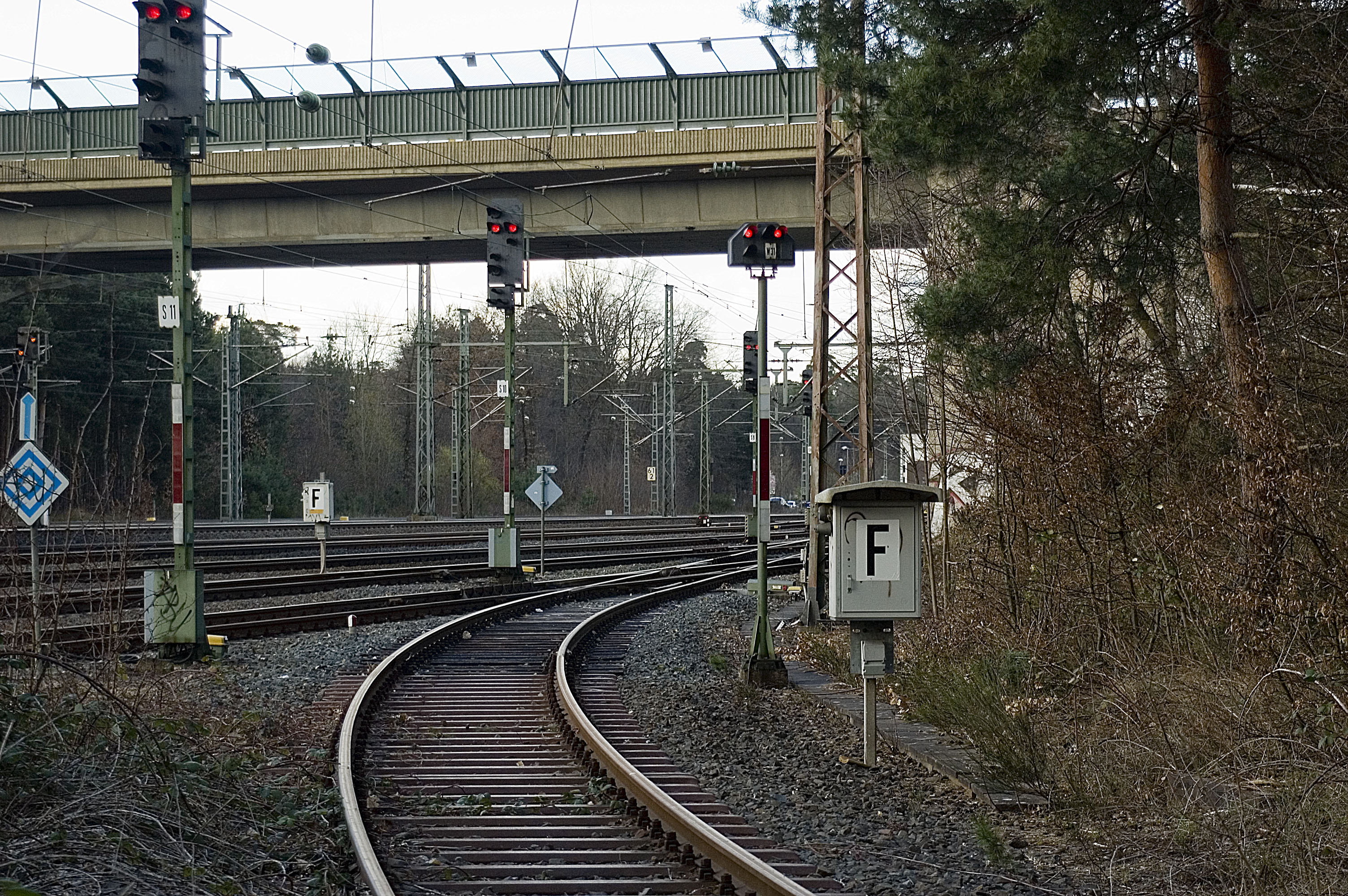 Spitzabweig von der Main-Neckar-Bahn nach Neu-Isenburg Güterbahnhof